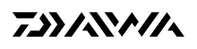 Le logo de la marque Daiwa a été modifié en 2008 a l'occasion des 50 ans de la marque dans le cadre d'une restructuration du groupe japonais Globeride, Inc.